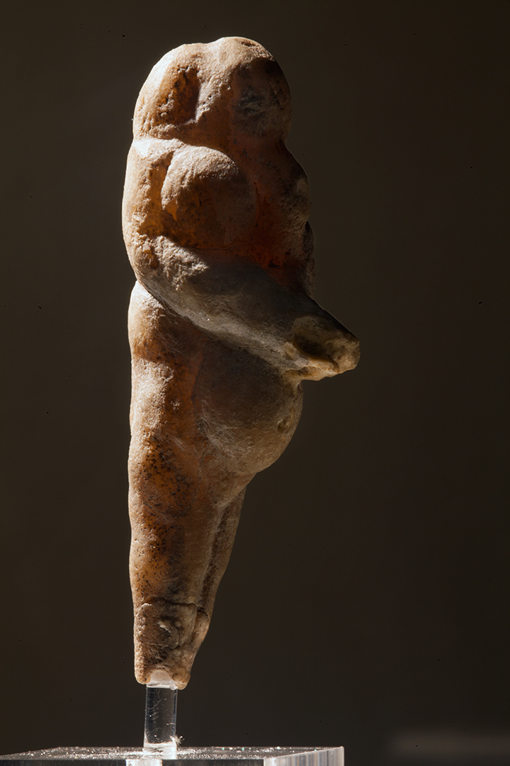 Museo Archeologico Nazionale delle Marche - MIBAC This is a photo of a monument which is part of cultural heritage of Italy.